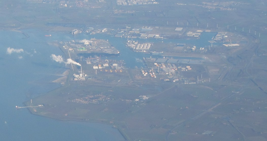 Sloegebied / Vlissingen Oost